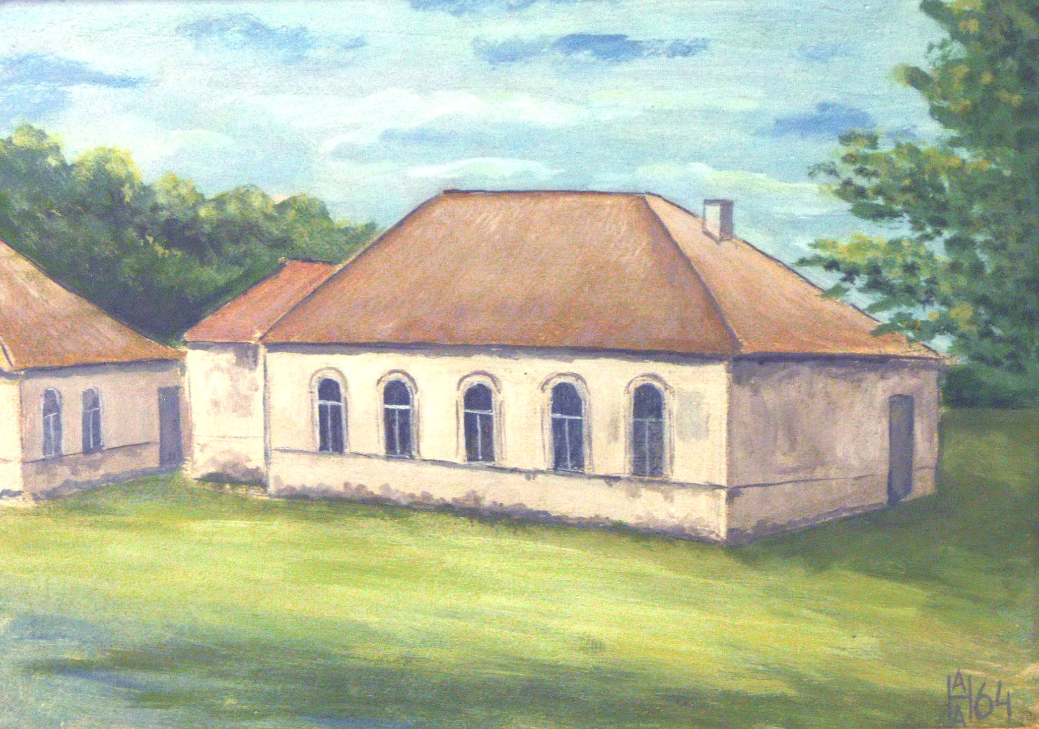 Мир, синагога, 1964 год. Яичная темпера. Художник - Анатолий Наливаев.